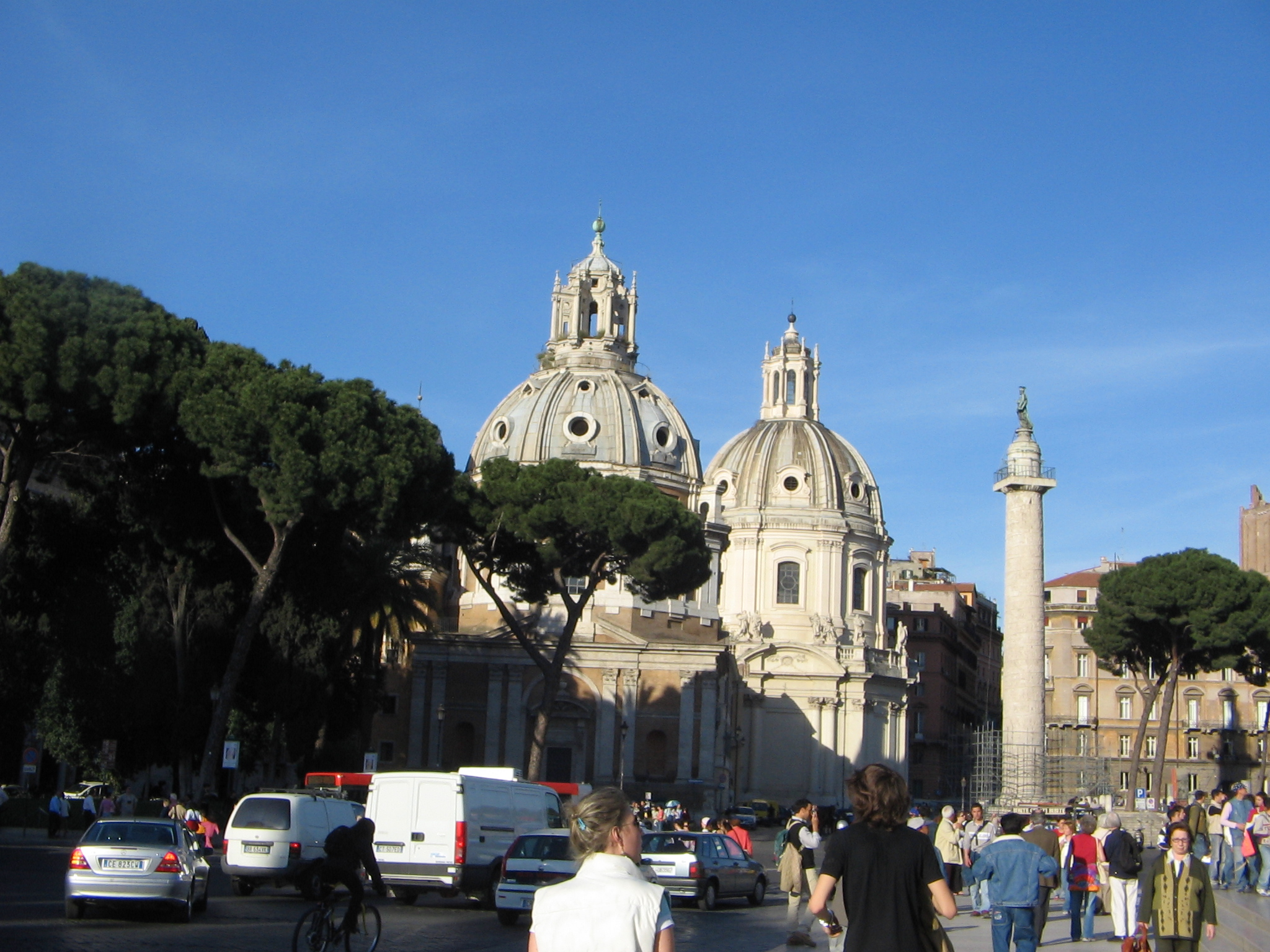 Santa Maria di Loreto (davanti) e Santissimo Nome di Maria a Roma. Le due chiese si trovano accanto alla Colonna Traiana. La prima è di Antonio da Sangallo il giovane, l'altra del francese Antoine Derizet.